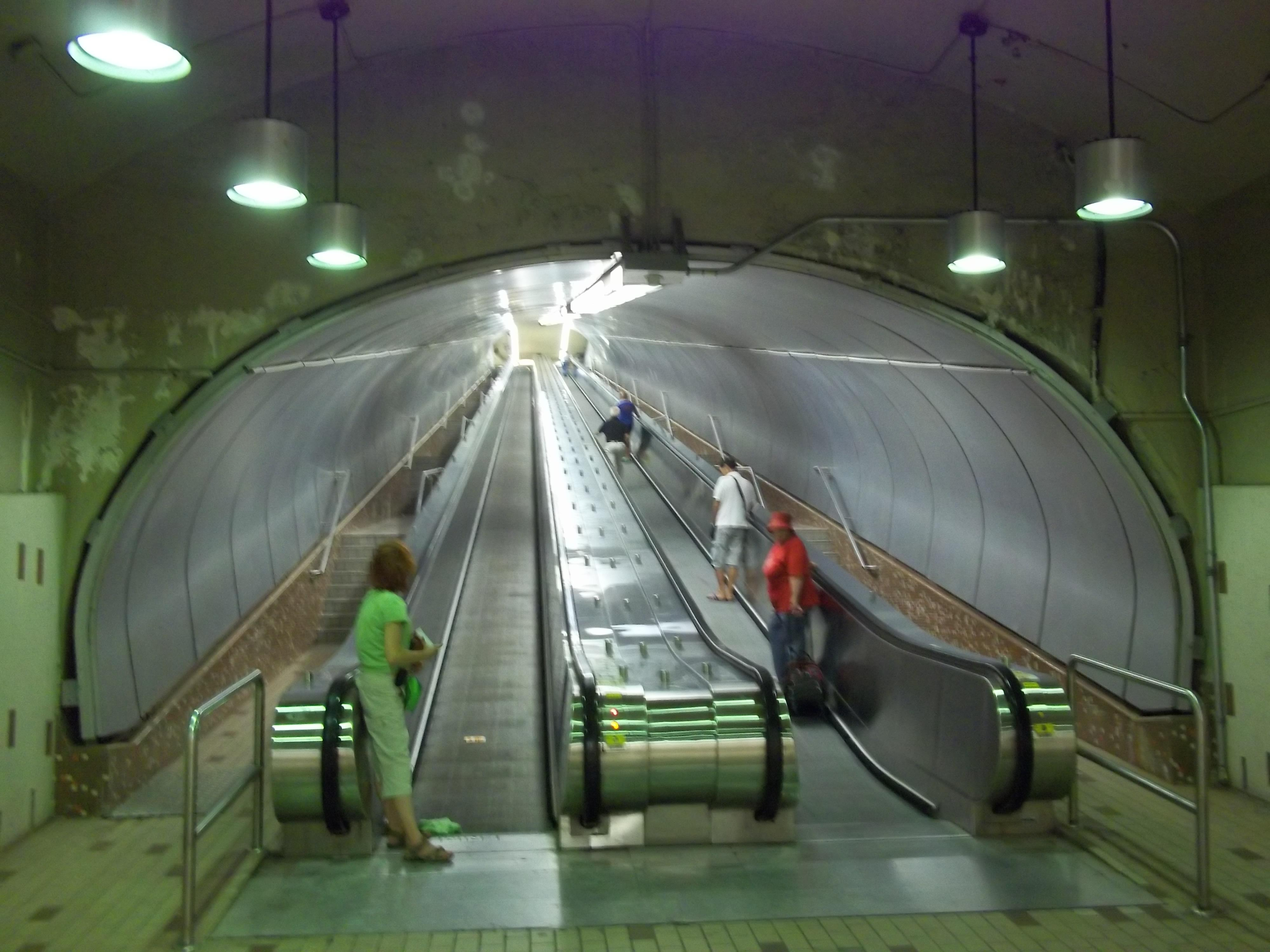 Tapis roulant, station de métro Beaudry, Montréal